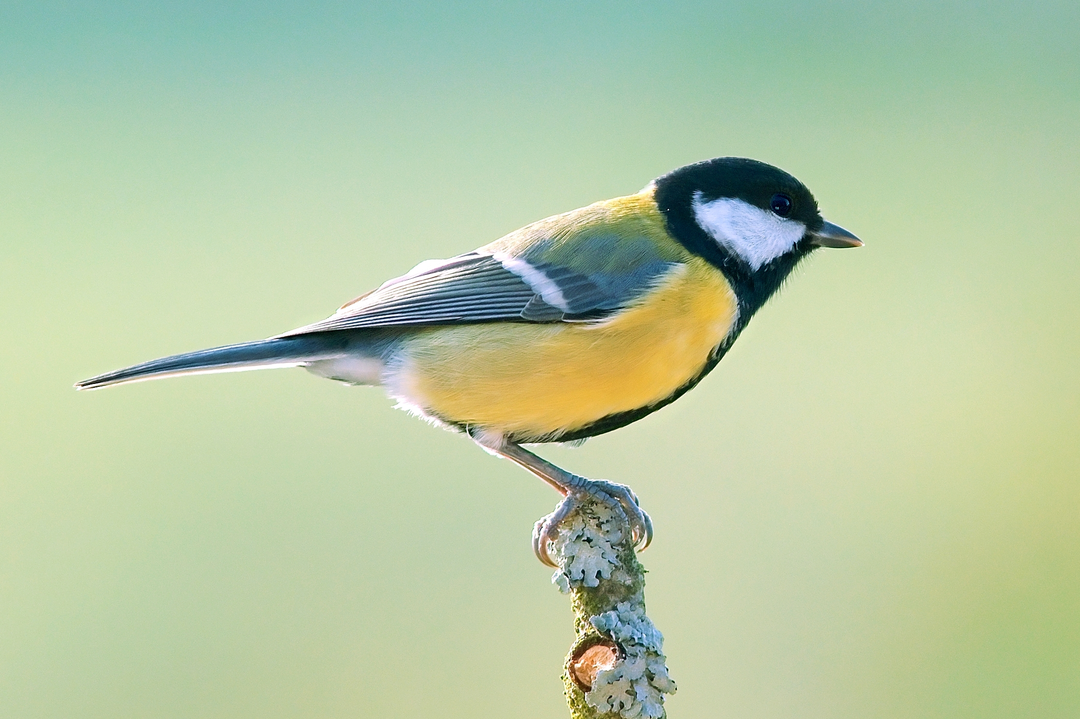 Parus major Mésange charbonière Great Tit Licence GFDL Pour toute utilisation veuillez noter le nom de l'auteur et la licence: Luc Viatour © GFDL